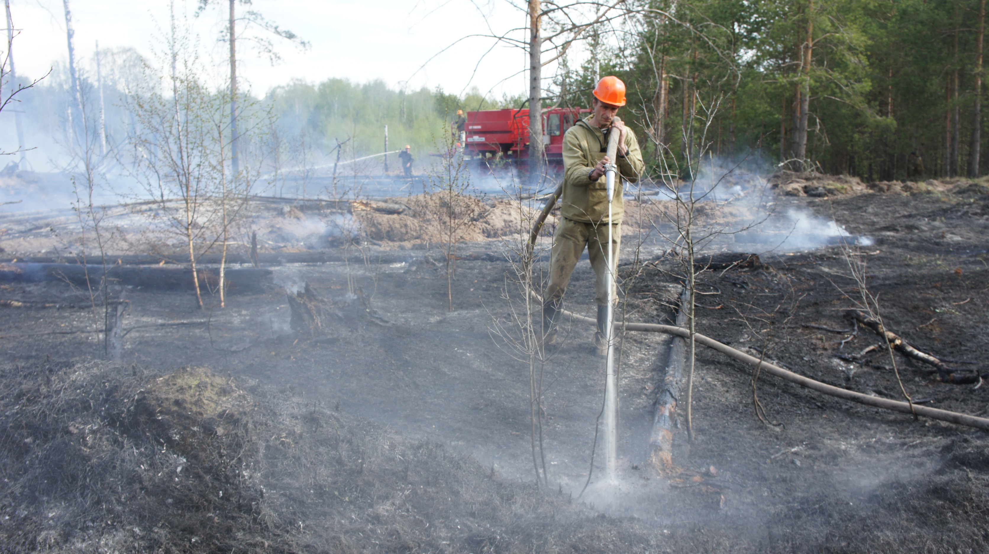 Сотрудники ГАУ МО "Центрлесхоз" ликвидируют лесной пожар